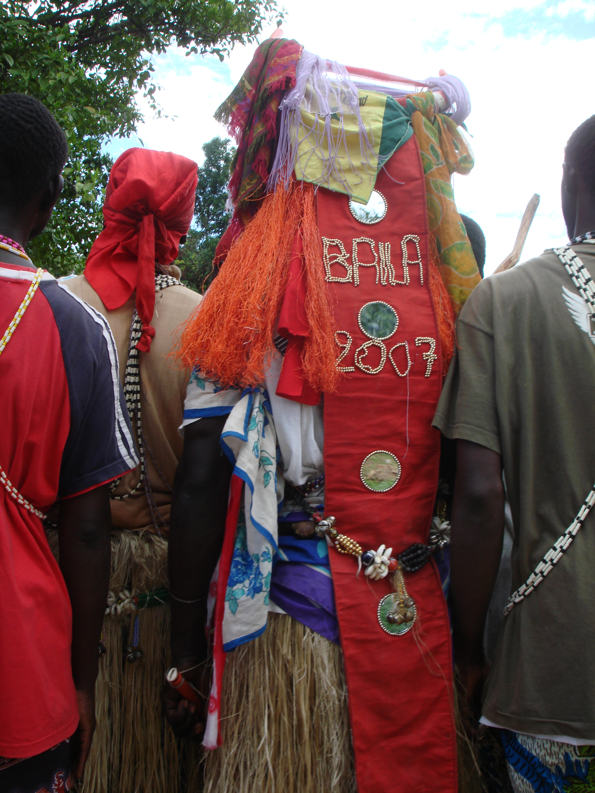 Boukout (rites d'initiation) à Baïla (Casamance, Sénégal)